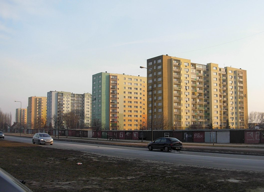 Fragment osiedla Bartodzieje w Bydgoszczy - widok od ul. Kamiennej